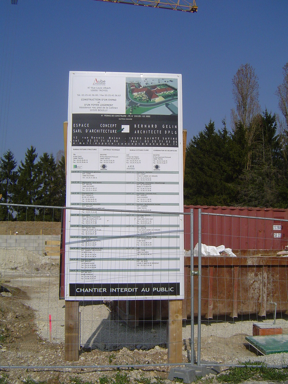 Bouilly - Construction EPHAD